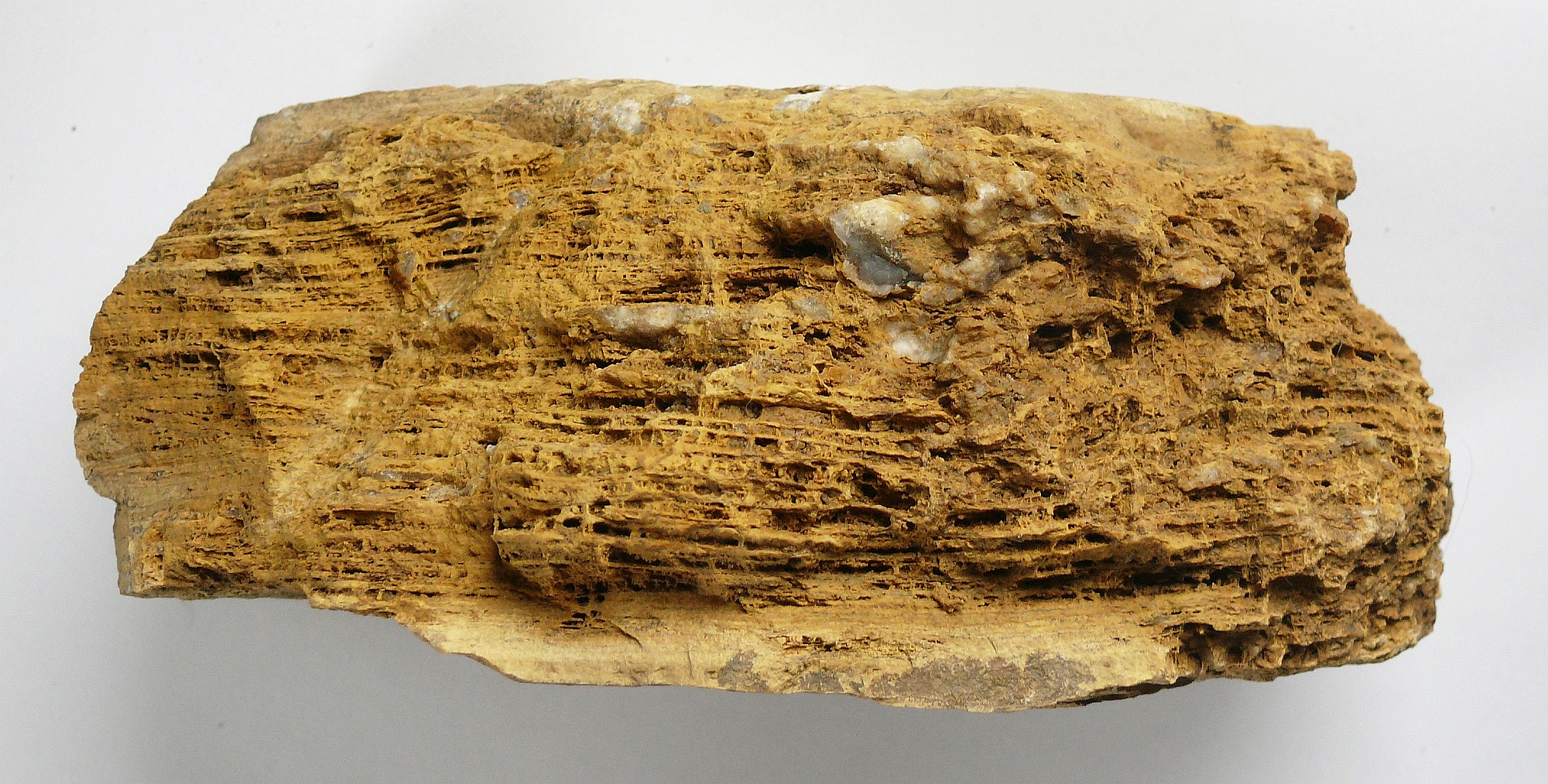 Zellendolomit, Mittlerer Muschelkalk, Schöntal-Westernhausen